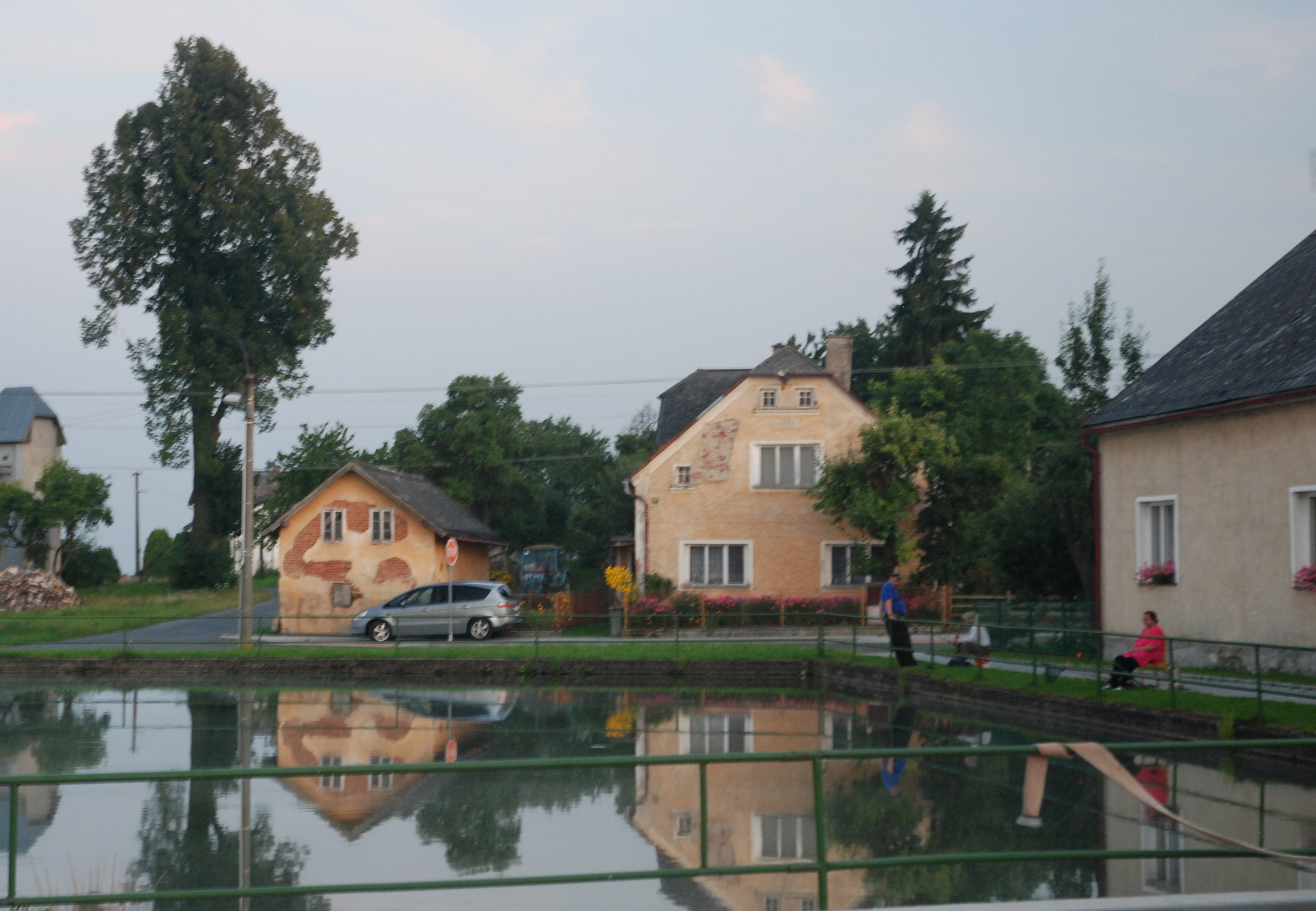 Ctiboř, rybník na návsi